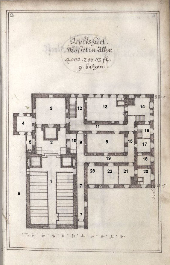 Lageplan Erdgeschoß Kapuzinerkloster Waldshut